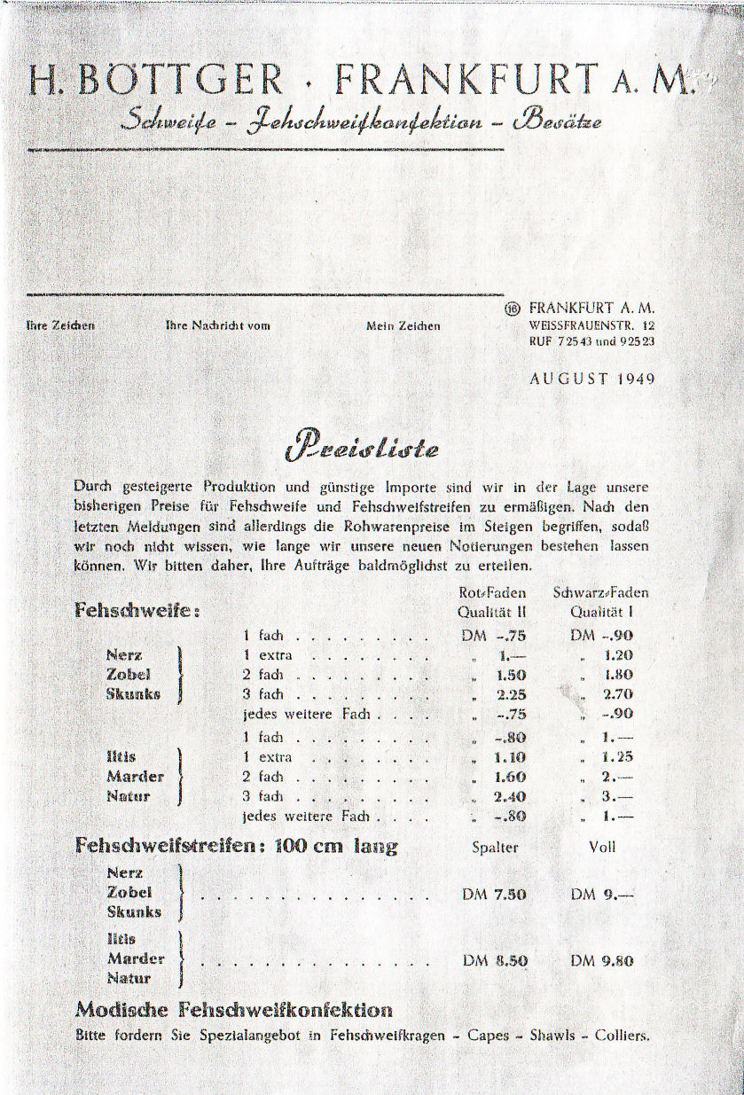 Schweife - Fehschweifkonfektion - Besätze. H. Böttger, Frankfurt a. M., Weissfrauenstr. 12. Preisliste.